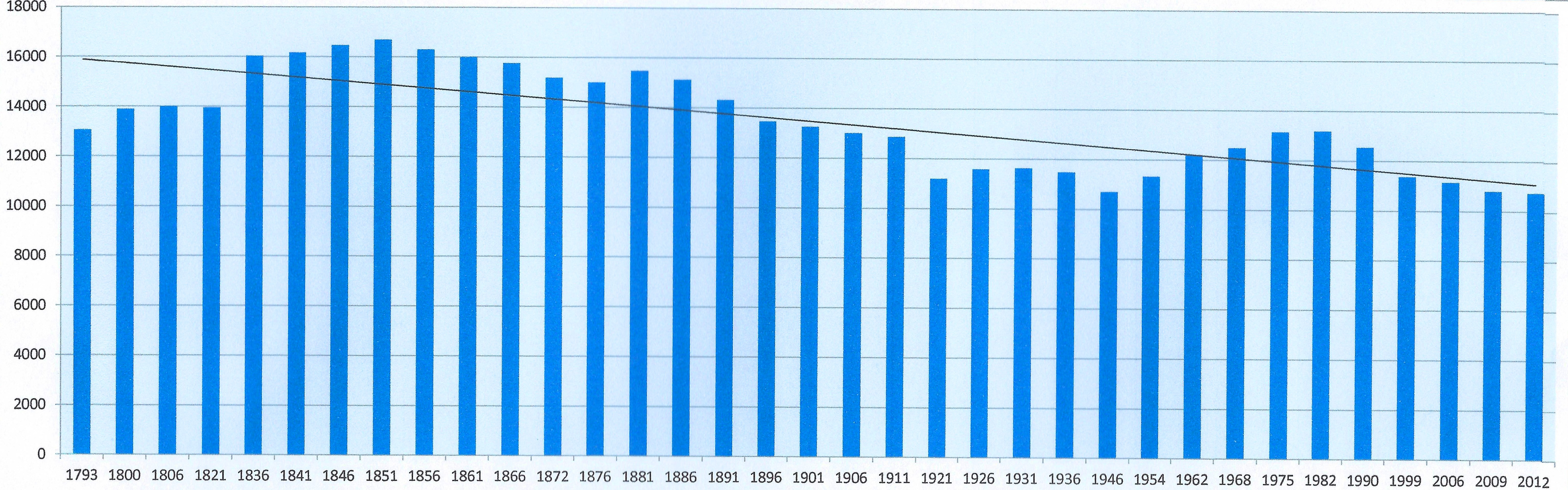 Evolution démographique de l'ancien canton de Châtillon-sur-Seine (Côte-d'Or)